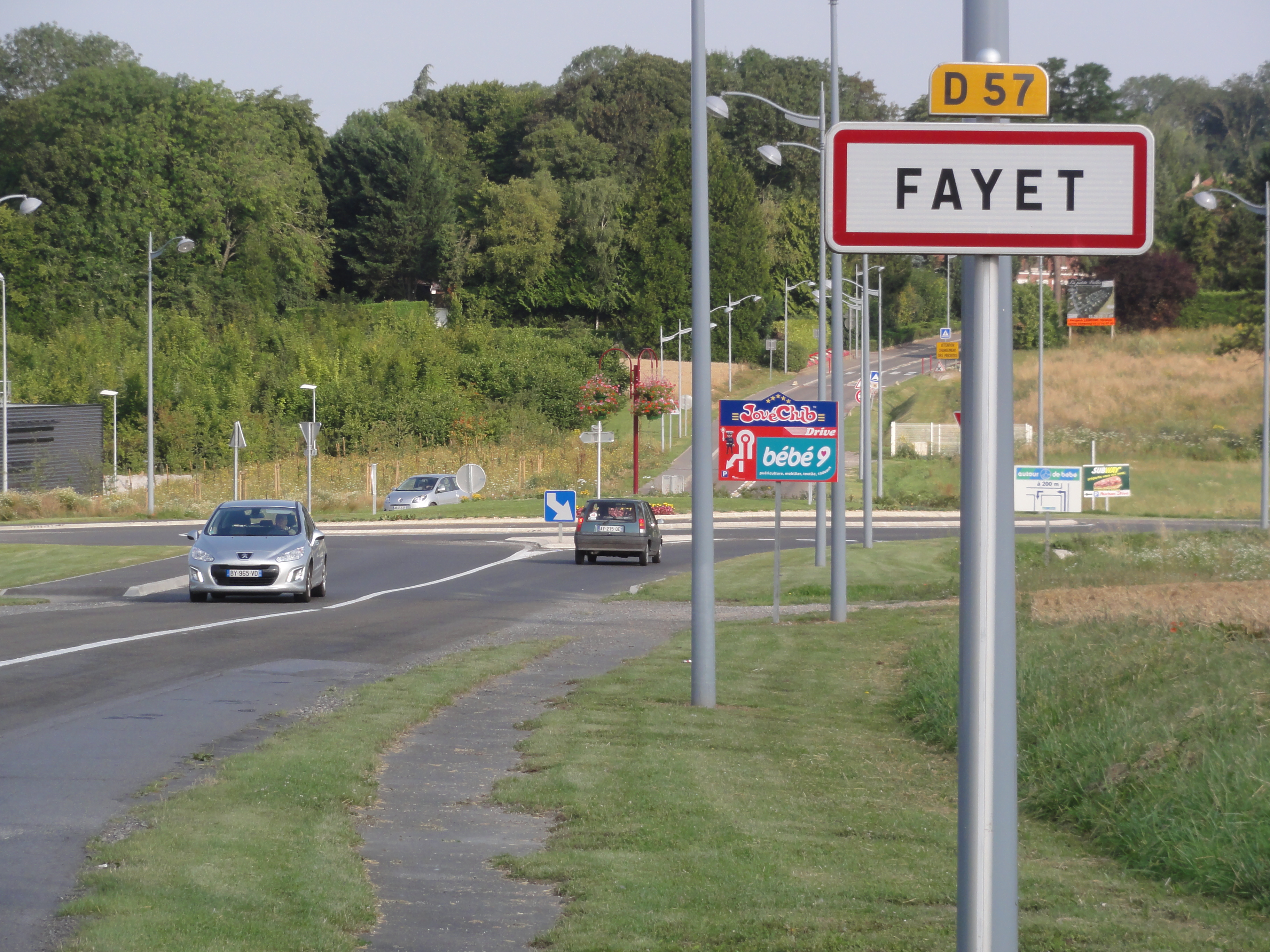 Fayet (Aisne) city limit sign